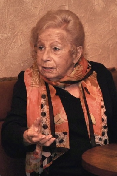 Marga Spiegel (Mitte) im Gespräch mit Anni Richter (geb. Aschoff), Verleger Dr. Wilhelm Hopf und Verlagslektor Benedict Lax-Grüneberg